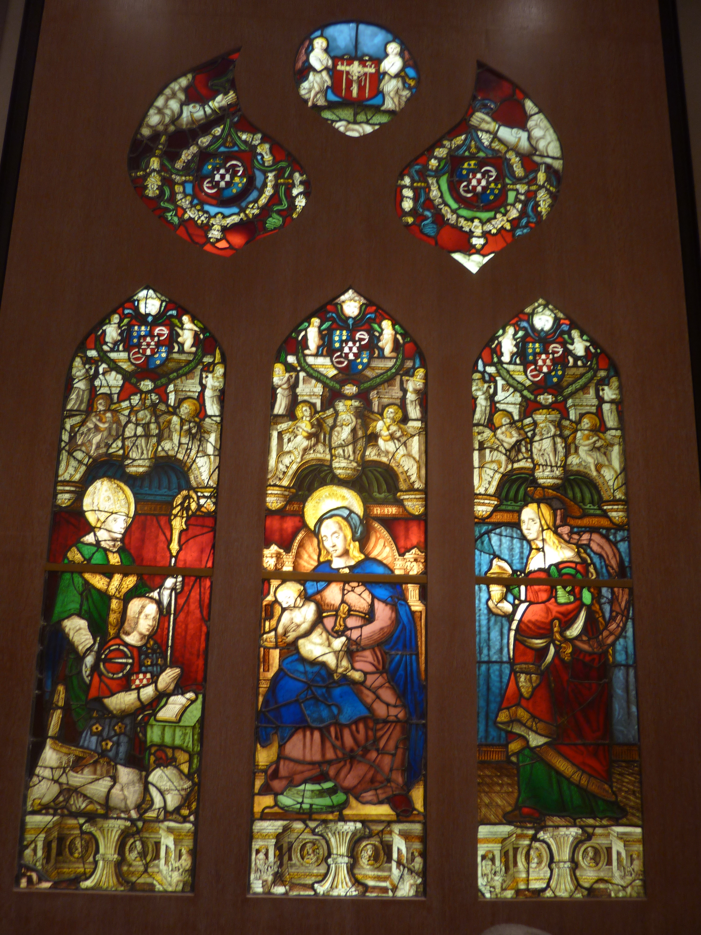 Quimper : vitrail "Vierge à l'Enfant entourée de sainte Marie-Madeleine, de saint Paterne[Evêque de Vannes] et du donateur Raoul de Kersauzon, seigneur de Coëtloguer" (Musée départemental breton). Ce vitrail du XVIème siècle (daté de 1535), provenant de la chapelle Saint-Exupère de Dineault (Finistère), fut acquis en 1896 par la "Société Archéologique du Finistère" et est exposé au Musée Départemental de Quimper